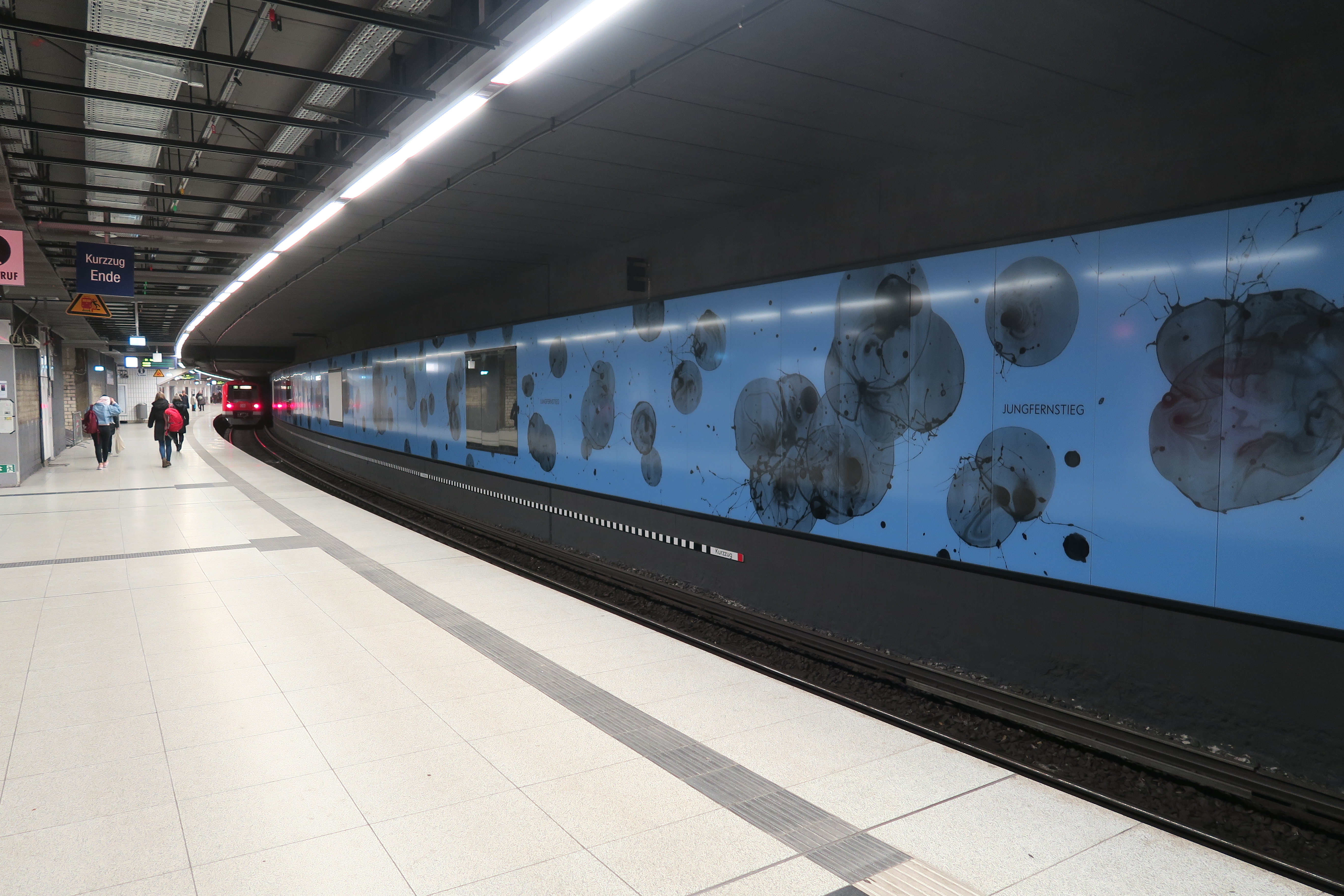 S-Bahnhof Jungfernstieg, März 2018